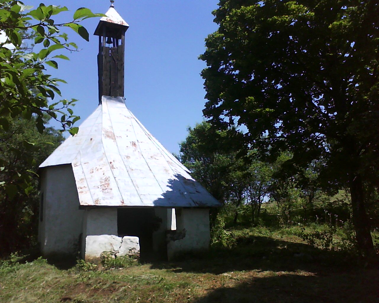 Kapela svete Ane, Griče